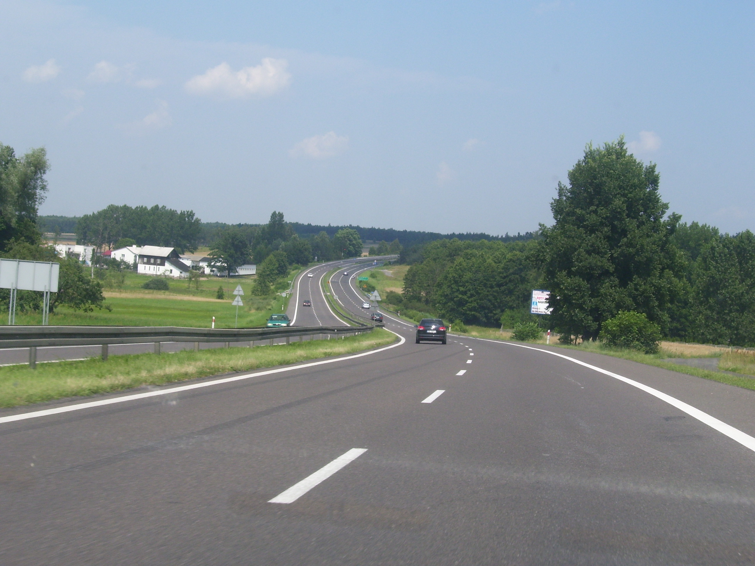 Droga krajowa nr 8 w Podkonicy.